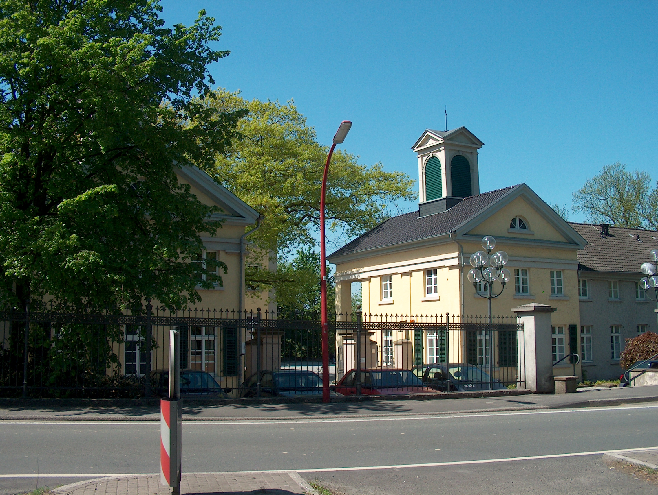 Haus Villigst:Teilansicht vom Eingangsbereich.